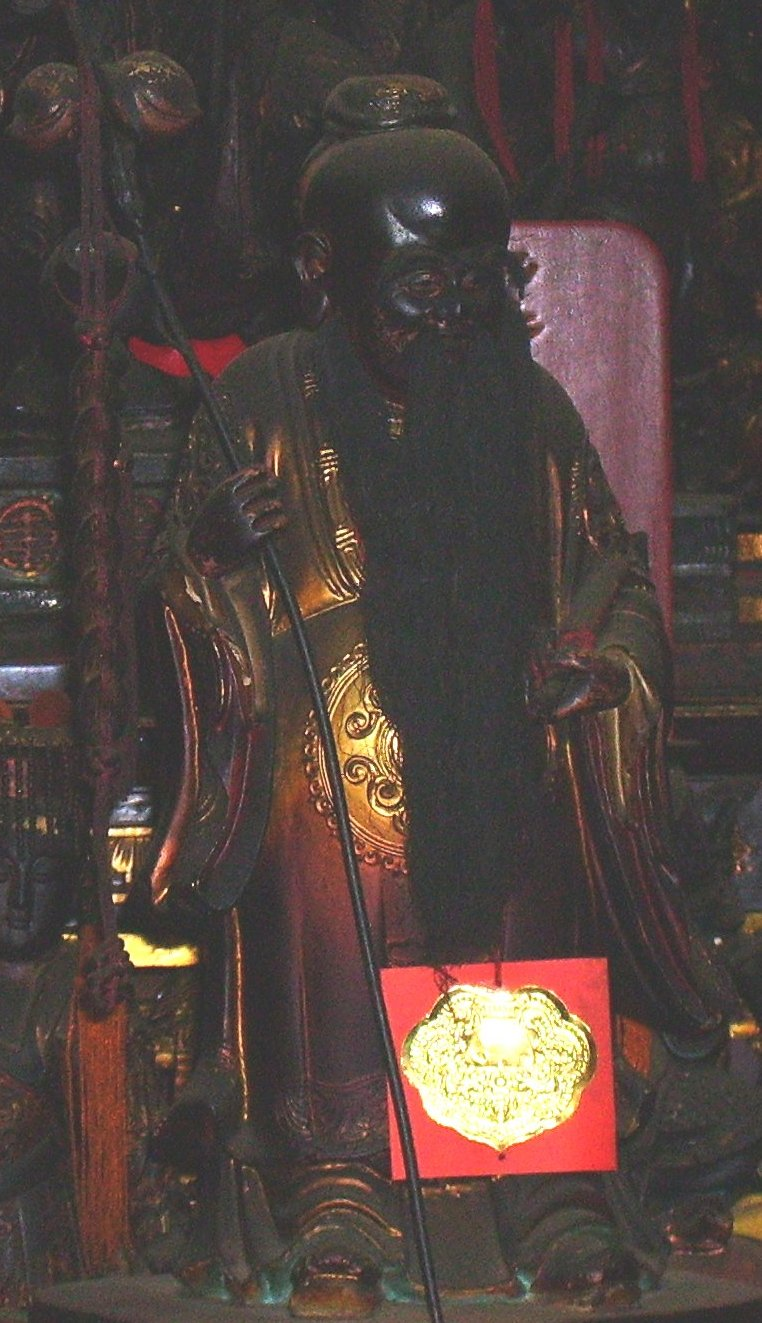 中文（台灣）: 臺北霞海城隍廟月下老人。